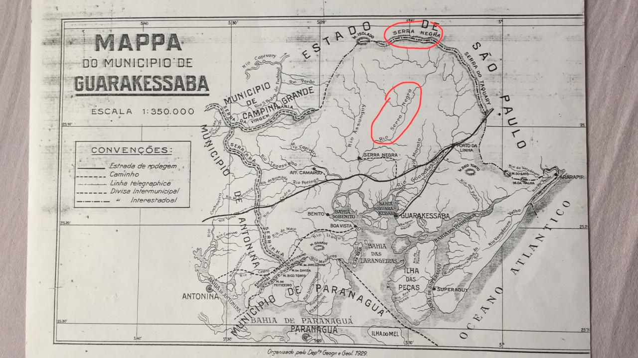 Serra Negra, Guaraqueçaba, Paraná, Brasil